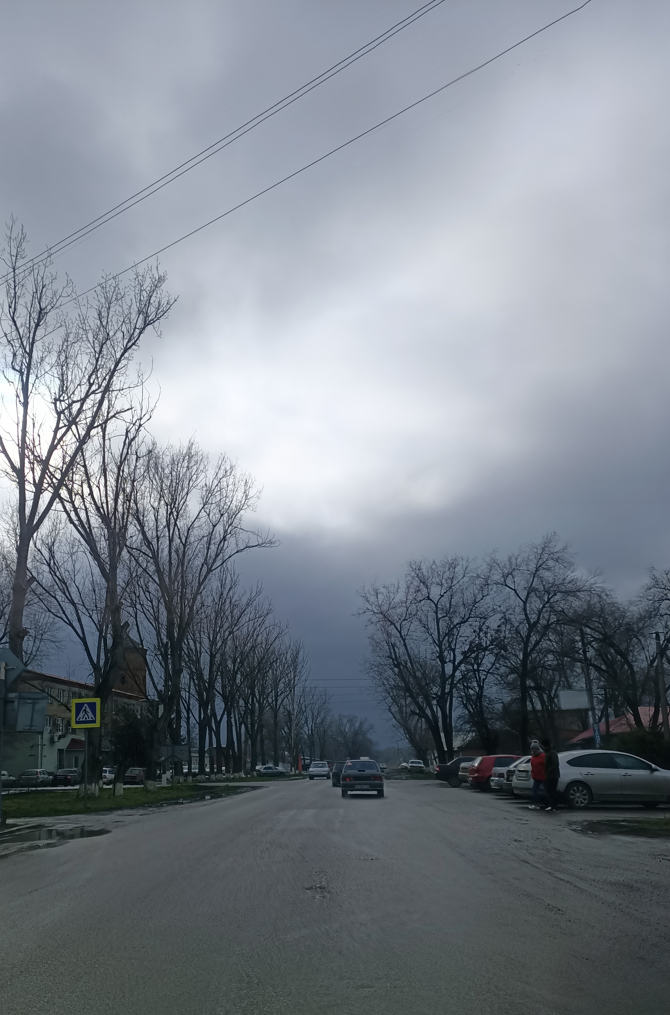 Кировский переулок, одна из"артерий" Городовиковска